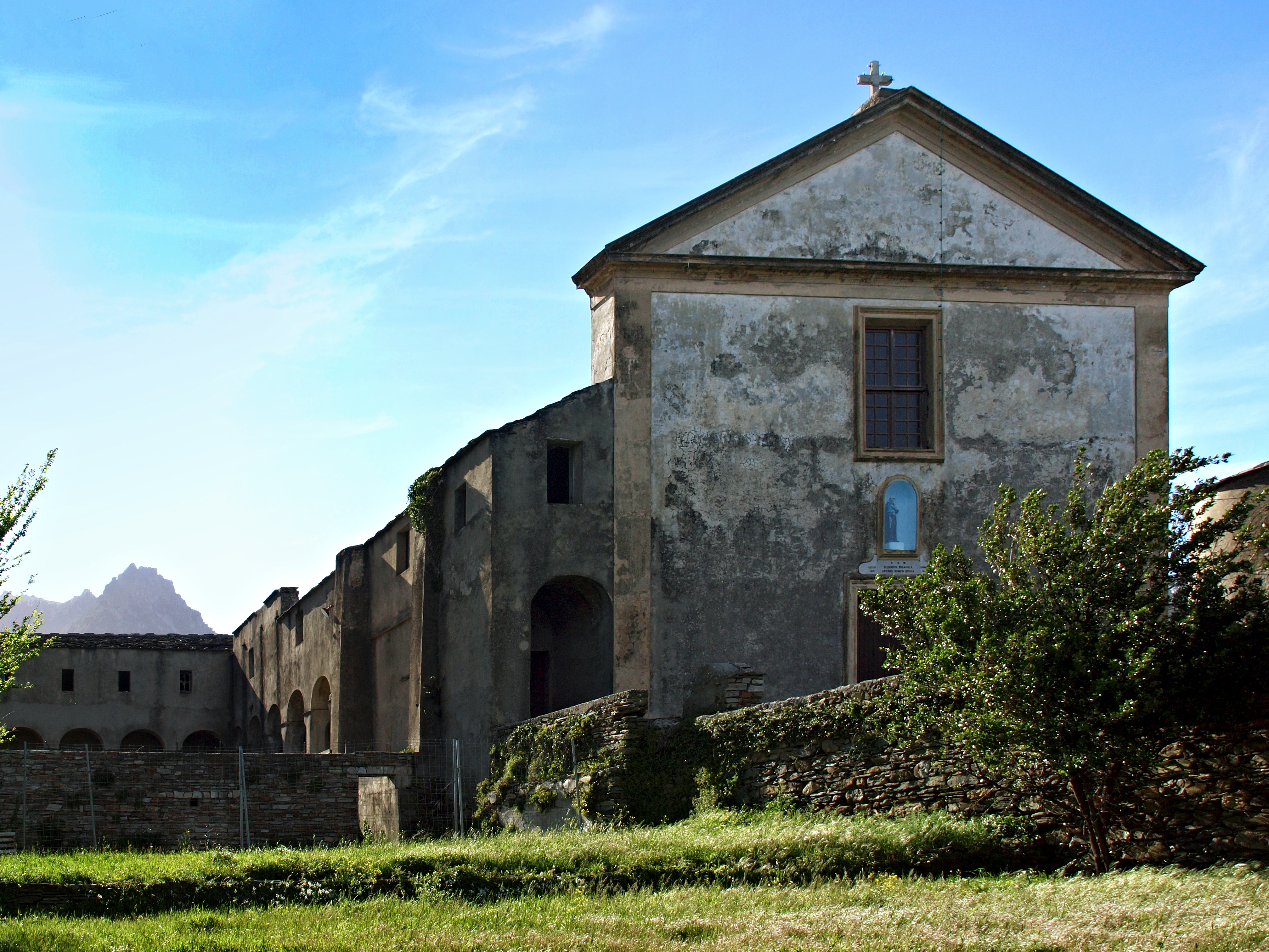 Sisco, Cap Corse (Corse) - Église du couvent Sant' Antone